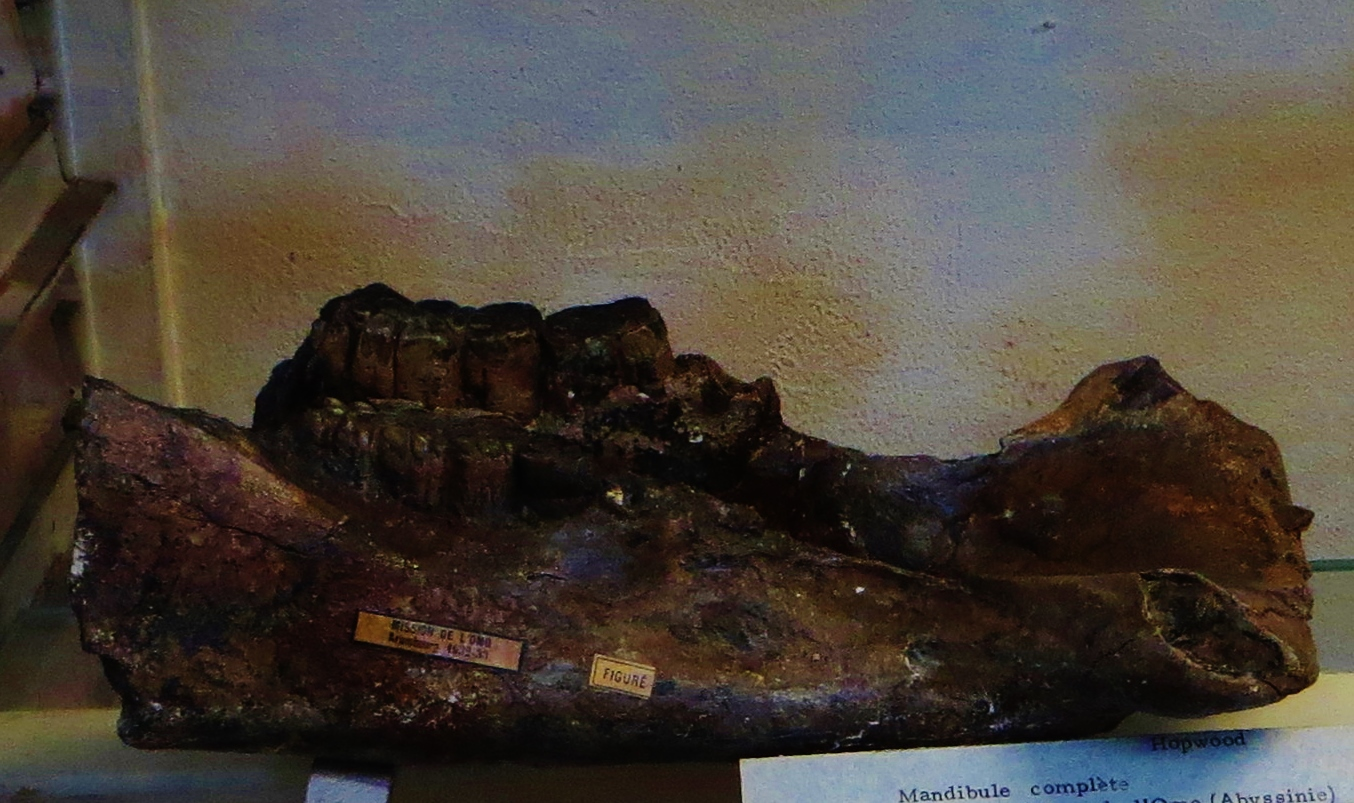 Fossil of Metridiochoerus, an extinct mammal- Took the photo at Musee d'Histoire Naturelle, Paris